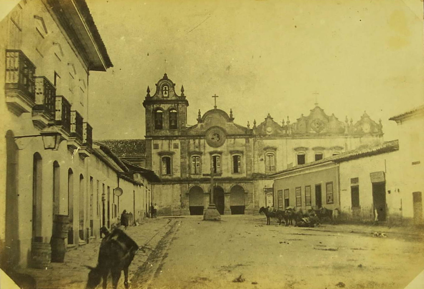 Largo do Capim (Largo São Francisco), São Paulo